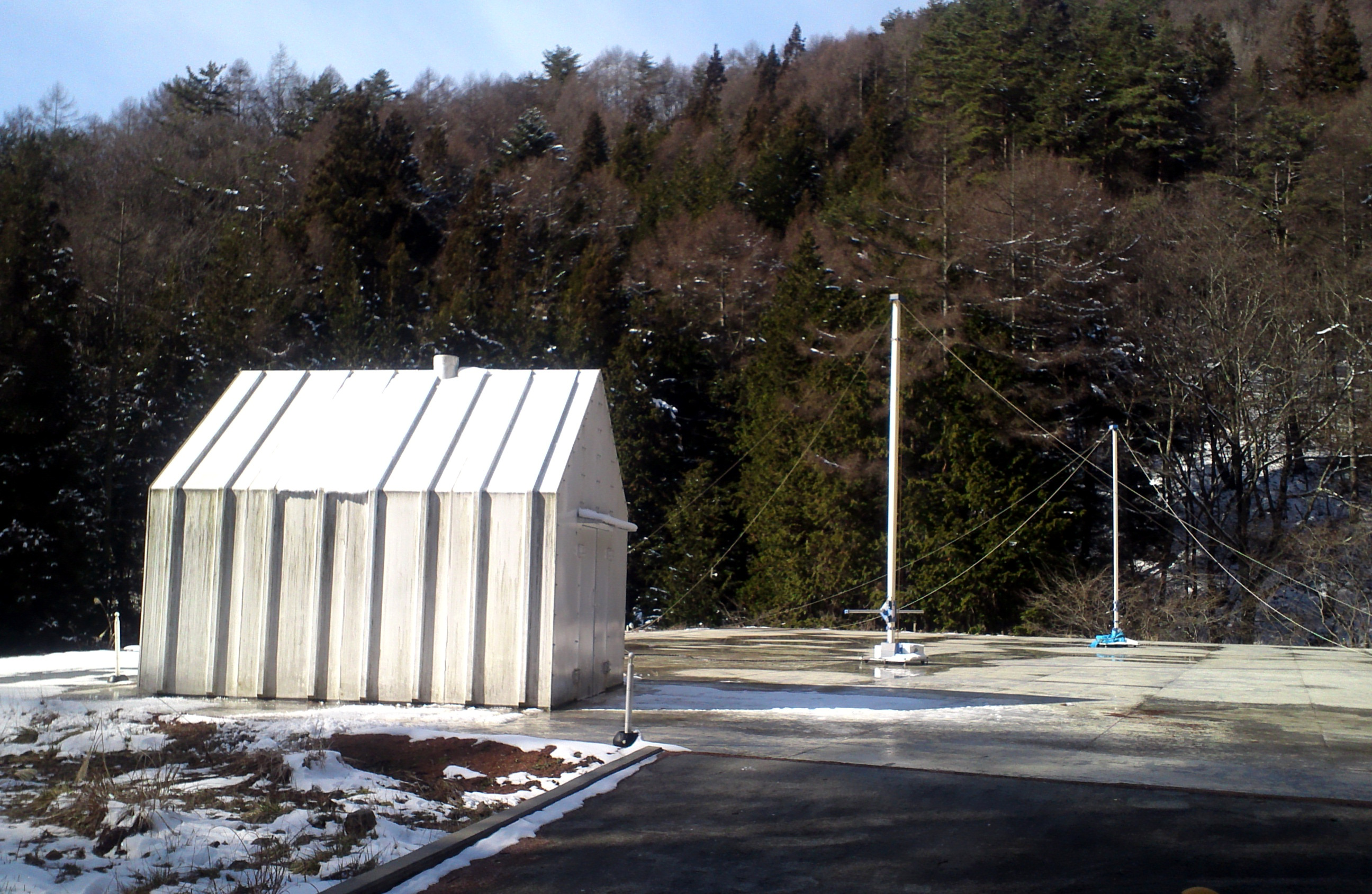 長野県工業技術センター 岡谷オープンサイト